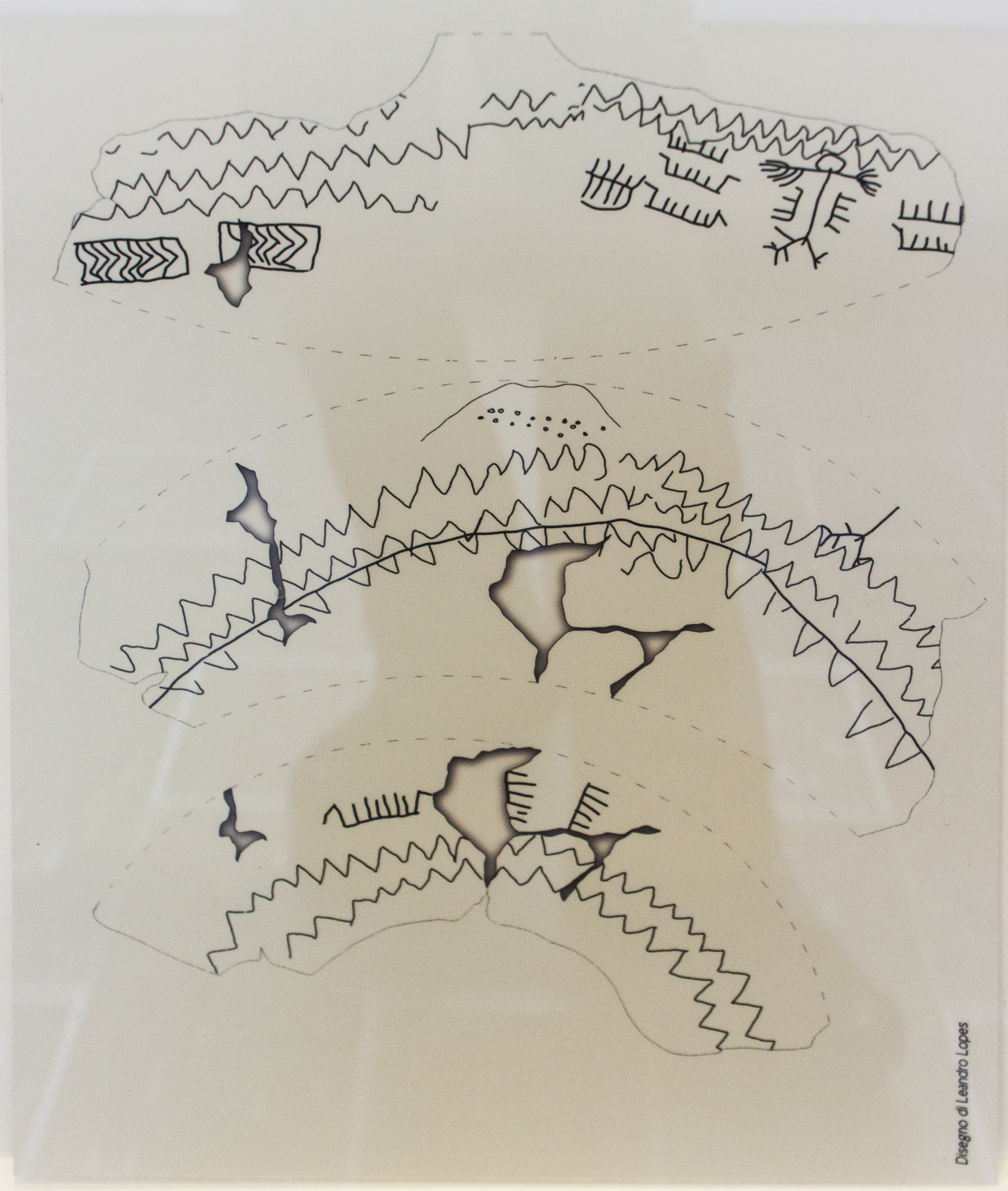 Età del bronzo antico, cultura di Capo Graziano, fase I 2300-1700 a.C. Filicudi, Filo Braccio